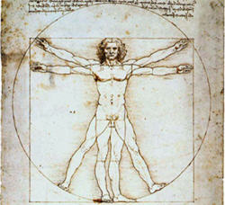 La perfection du corps : les proportions du corps humain